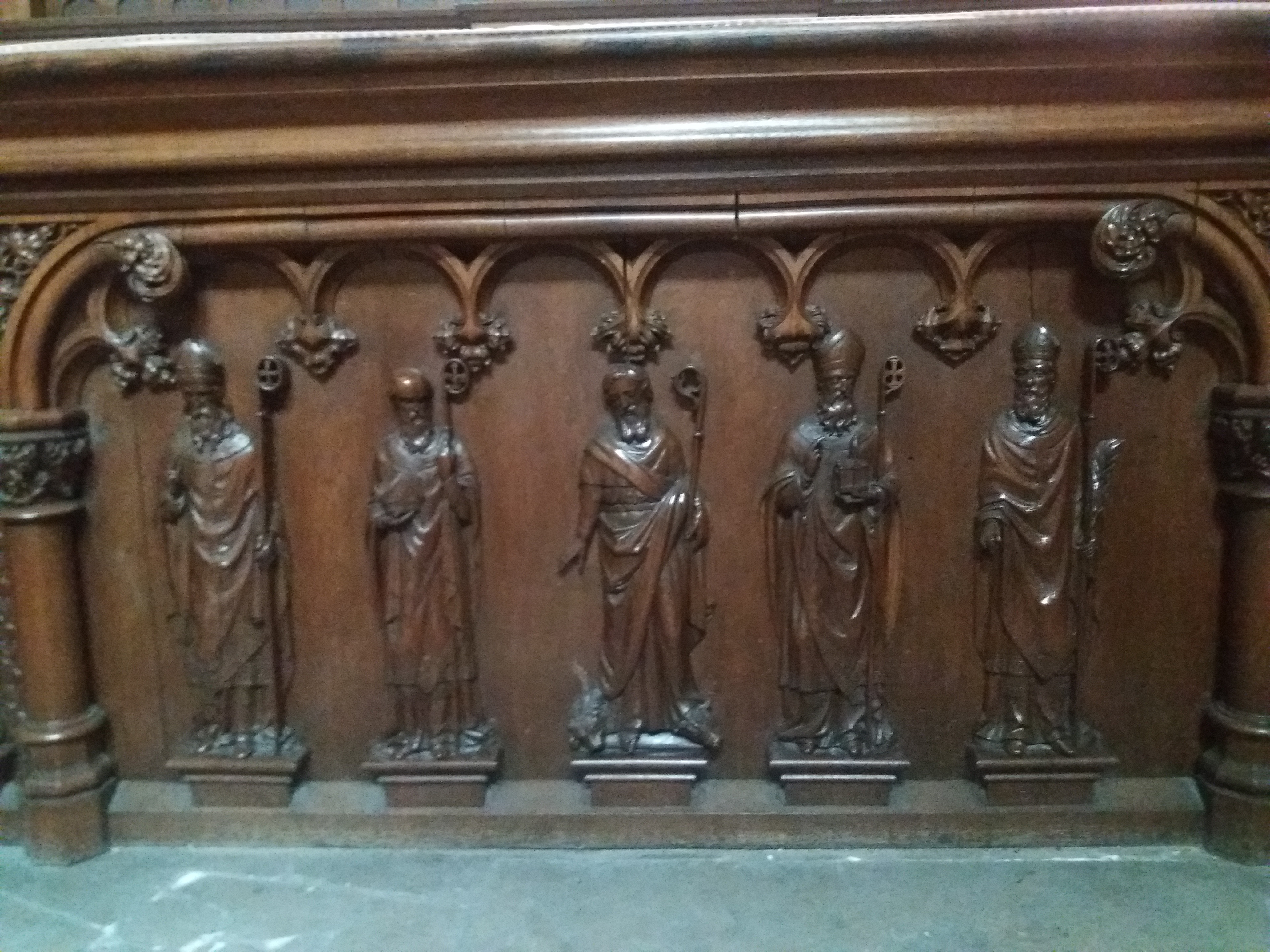 Détail de l'autel du Saint-Sacrement, dans la chapelle absidiale sud de l'église abbatiale Saint-Taurin à Evreux.